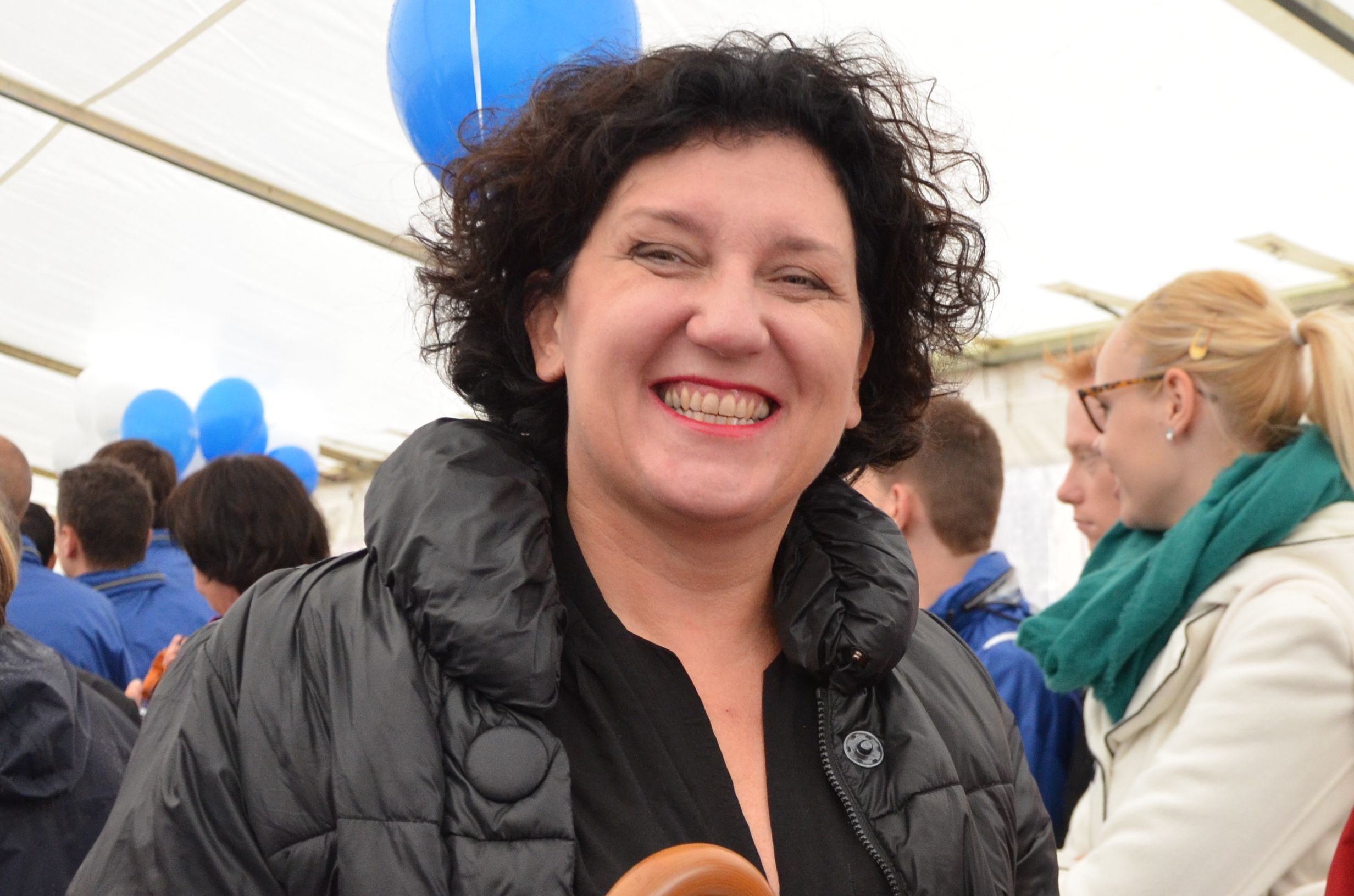 Annemie Turtelboom op bezoek in Mechelen tijdens de Open VLD dag van 14 september 2013.